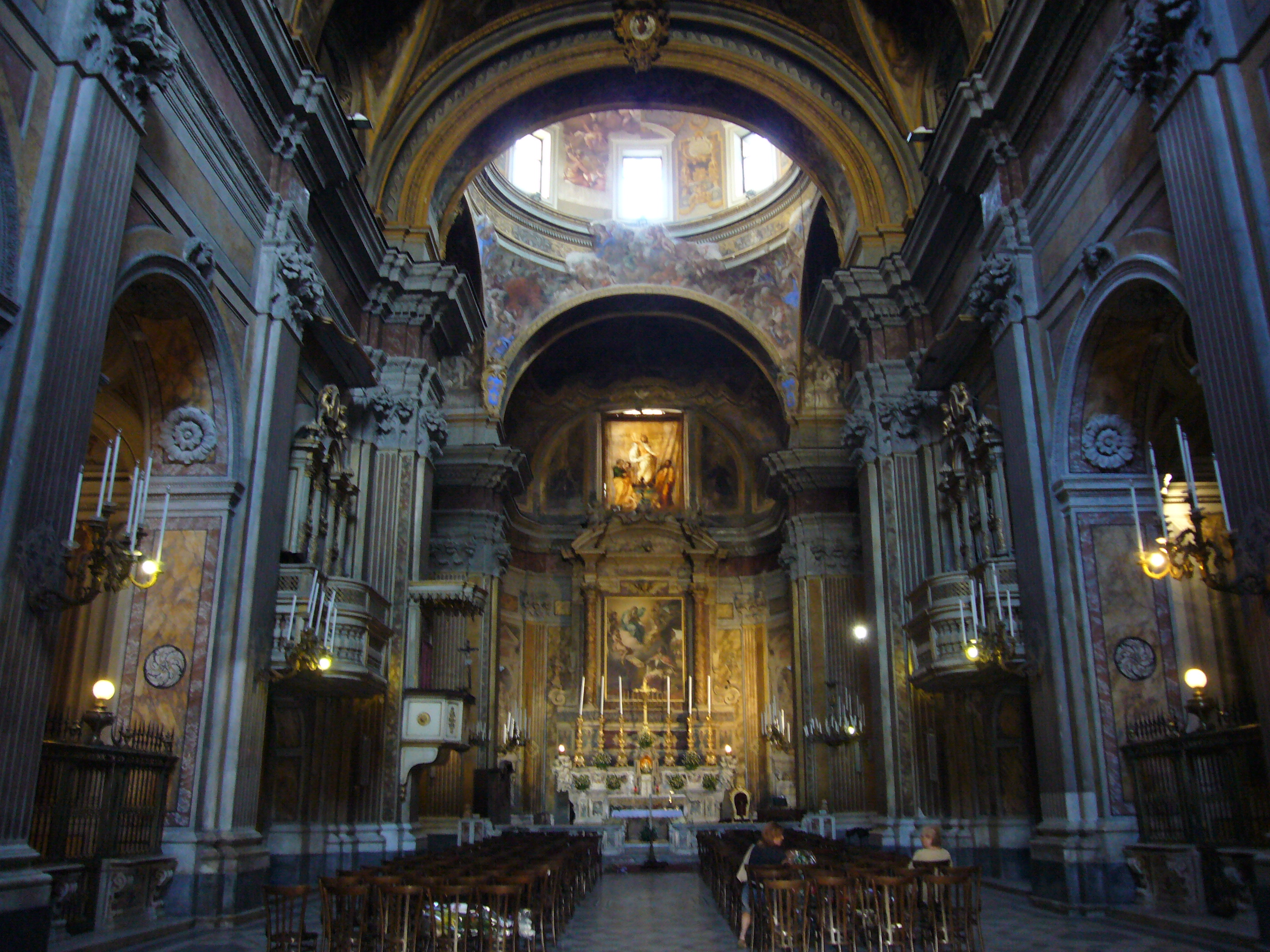 Napoli, San Ferdinando, interno